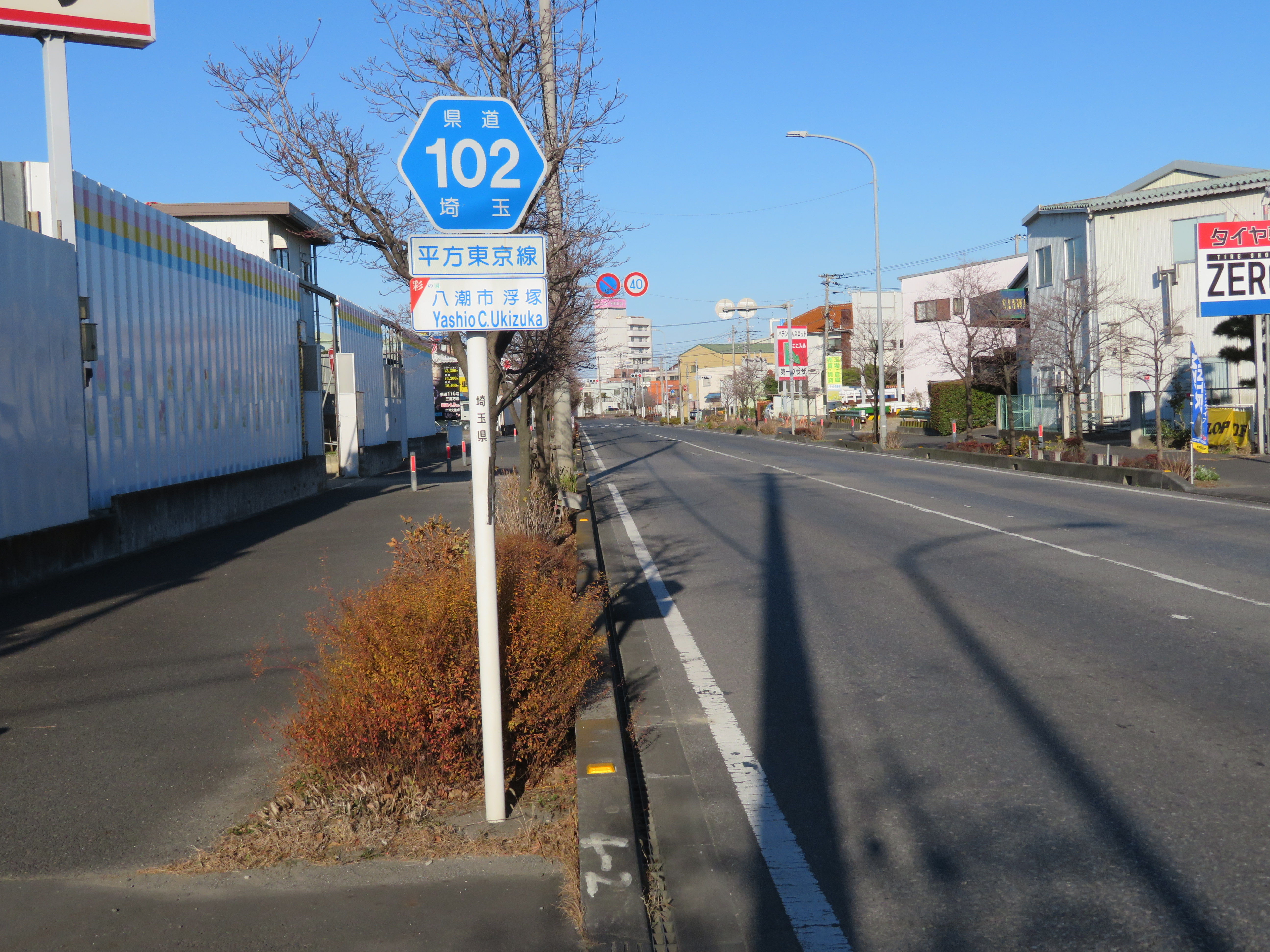 埼玉県道102号線八潮市浮塚付近（三郷方面を撮影） Canon PowerShot SX720 HS